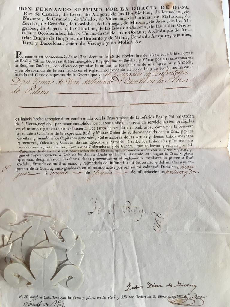 CEDULA REAL DE FERNANDO VII DONDE SE RECOGE EL NOMBRAMIENTO DE TOMAS DE VERI (BRIGADIER) A LA ORDEN DE SAN HERMENEGILDO